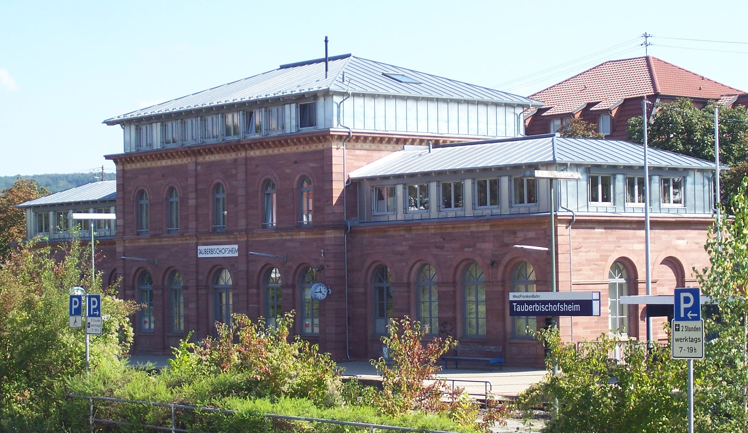 Bahnhof Tauberbischofsheim (erbaut 1865-1868); seit 2007 ist in dem Gebäude die Fachschule für Sozialpädagogik untergebracht.